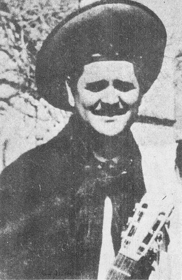 Fotografía del payador uruguayo Carlos Molina aparecida en la revista argentina "Rincón del Payador" nº1, en junio de 1980.